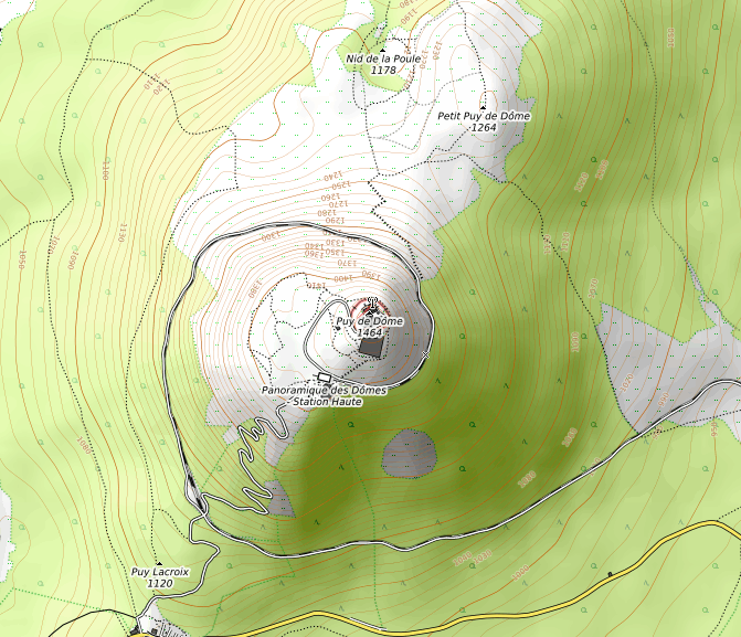 carte réalisée sur umap This map may be incomplete, and may contain errors. Don't rely solely on it for navigation.